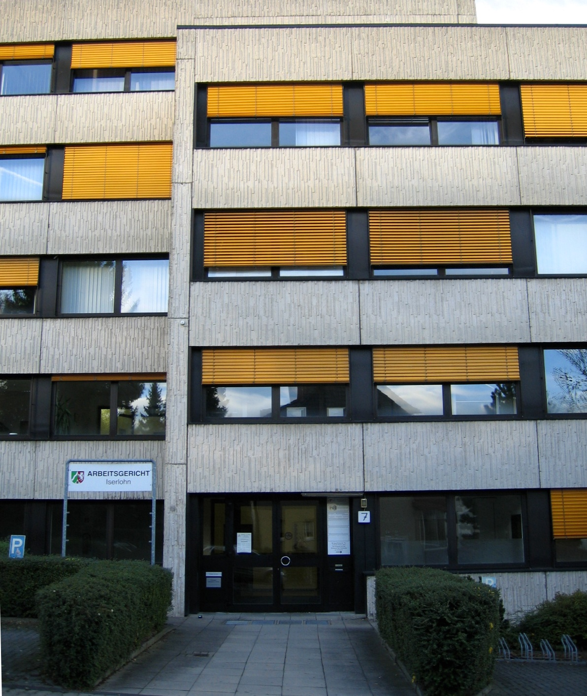 Description: Eingangsbereich des Arbeitsgerichts Iserlohn, Erich-Nörrenberg-Straße 7 in Iserlohn Source: selbst fotografiert Date: 27. Okt. 2005 Author: Bubo